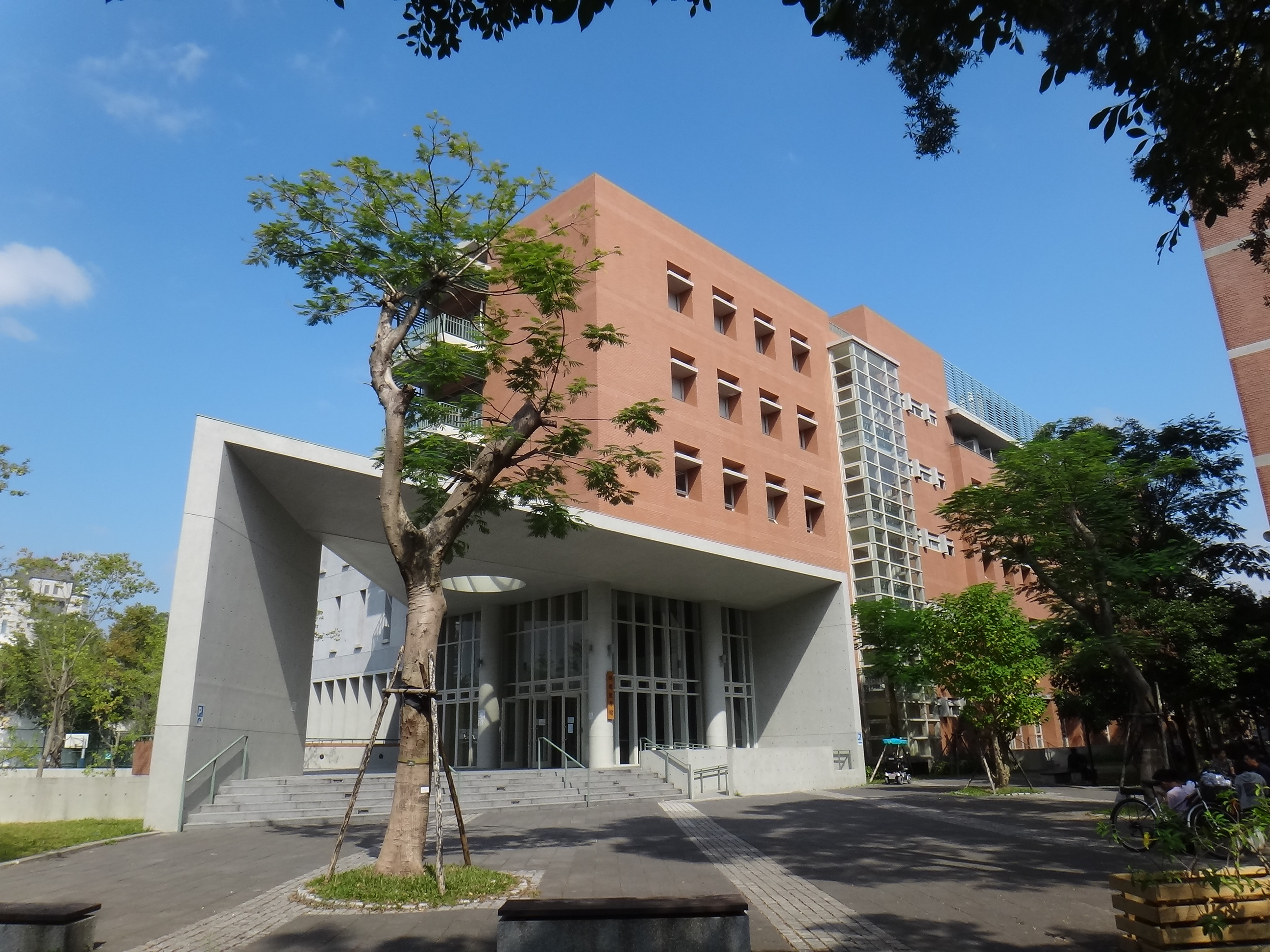 中文（台灣）: 台灣大學博雅教學館-朴樹側入口